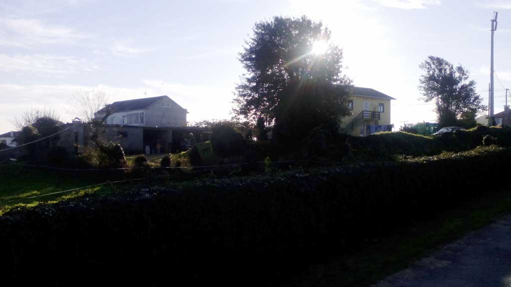 Castro de Santo Tomás de Taraza, Valdoviño.